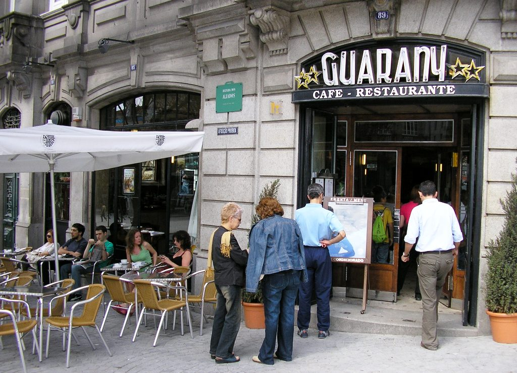 "Café Guarany" in Porto, Portugal